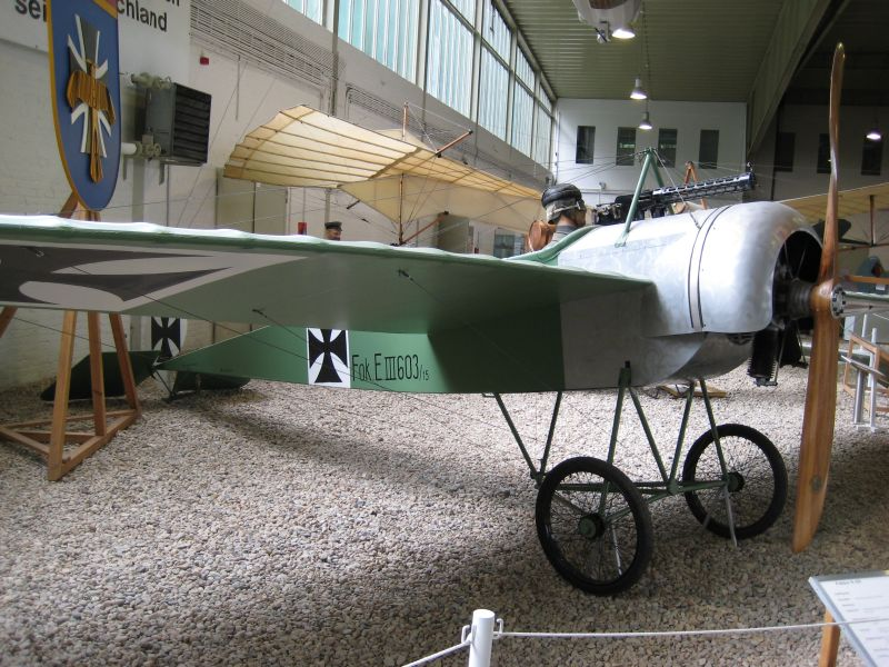 Fokker E.III, Replik, ausgestellt im Luftwaffenmuseum Berlin Gatow